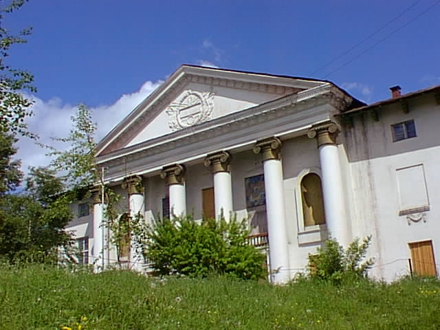 Дом культуры